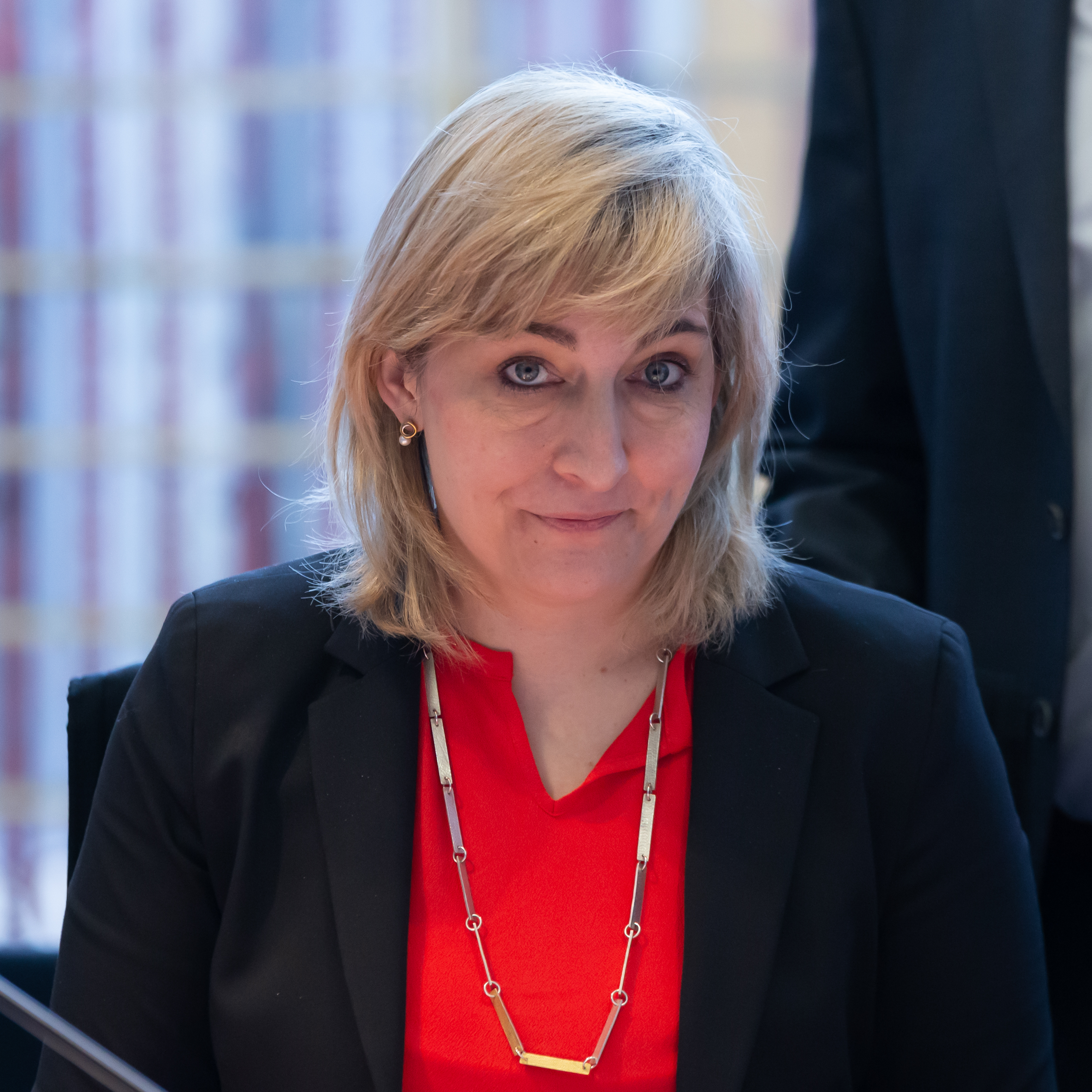 Deutscher Bundestag; Nina Warken, CDU, stellv. Vorsitzende des Untersuchungsausschusses "PKW-Maut"